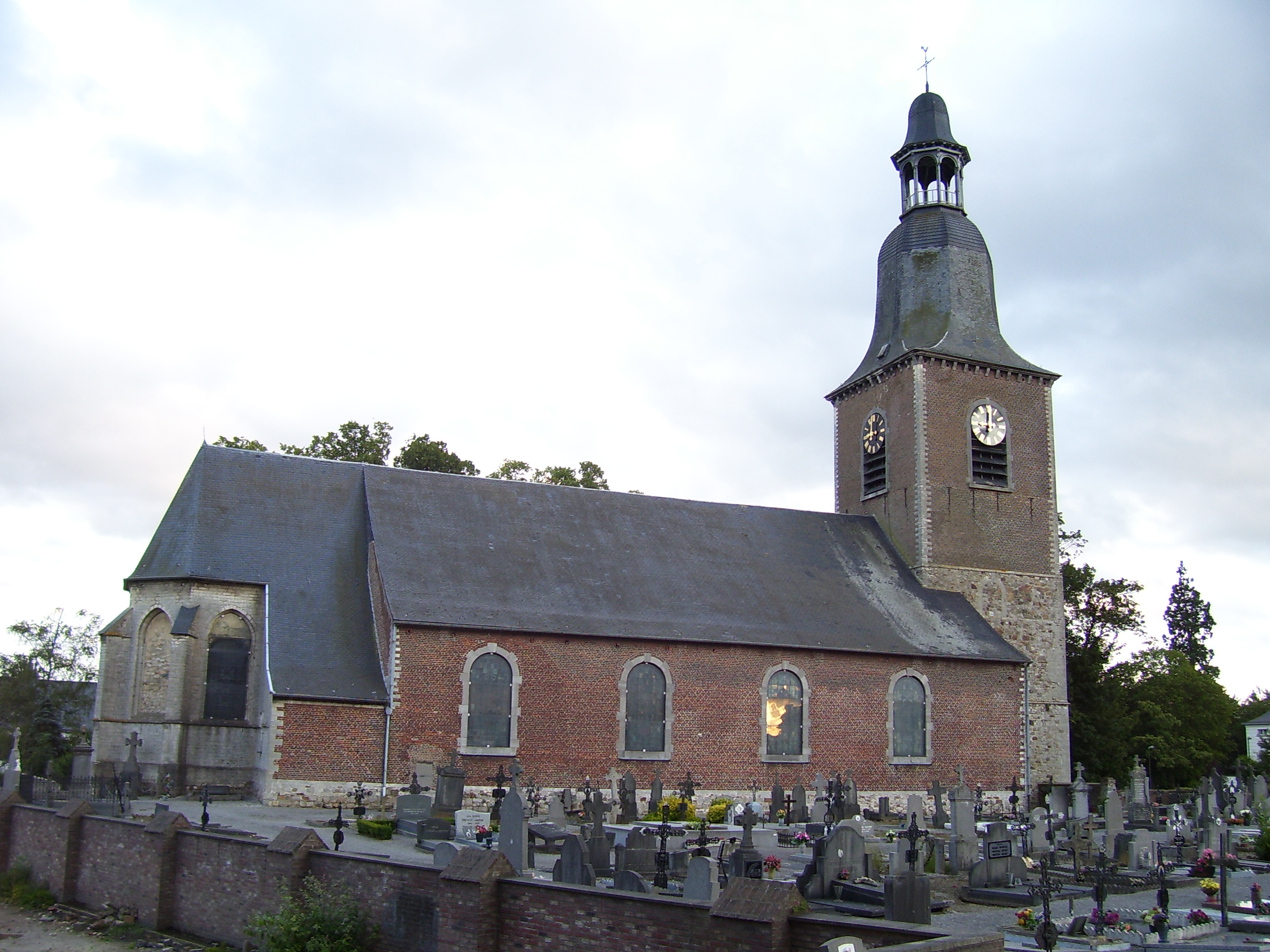 Saint-Martin church in Perwez, Belgium